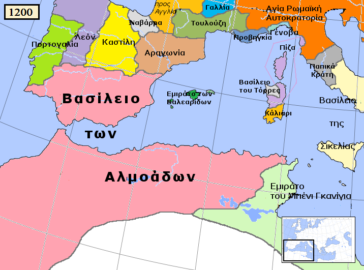 Το Βασίλειο των Αλμοάδων το 1200 μ.Χ.